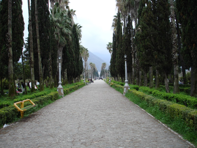 تصویری از فضای مقابل هتل رامسر